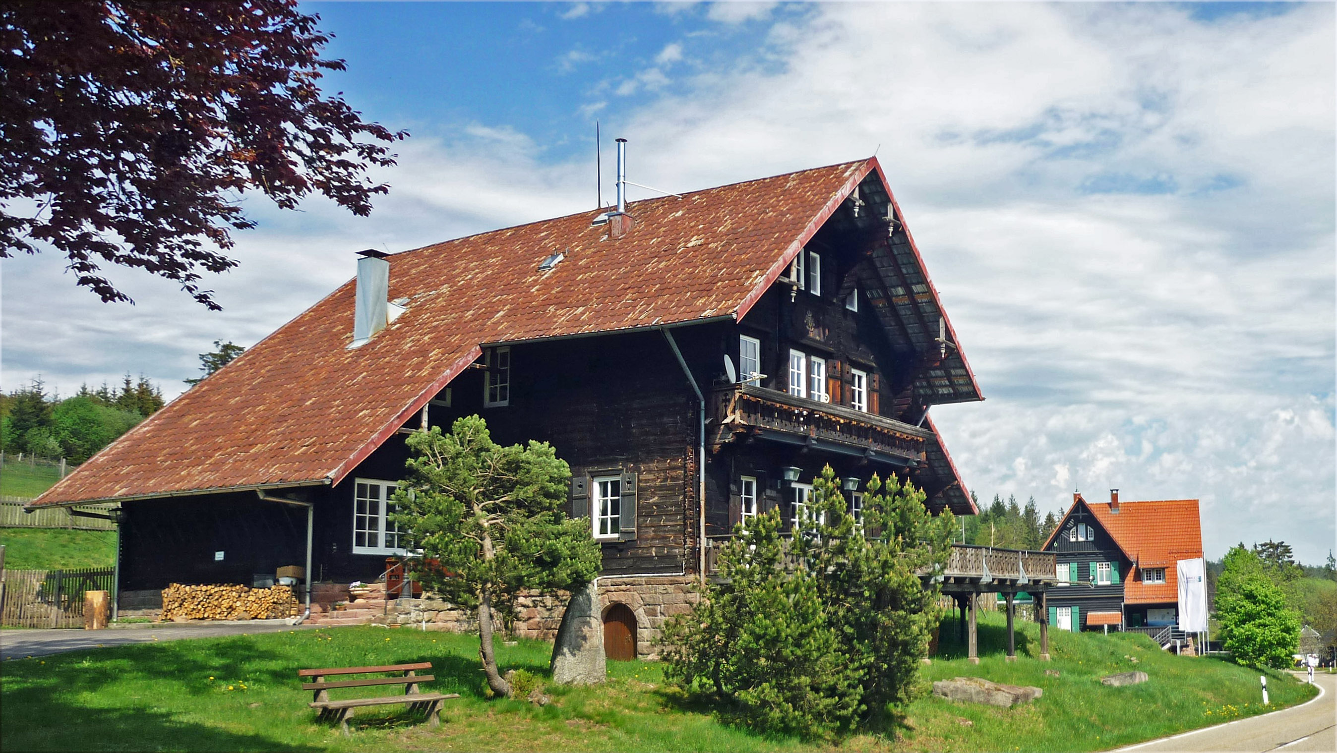 Gernsbach-Kaltenbronn, Lkr. Rastatt im Schwarzwald: Großherzogliches Jagdhaus